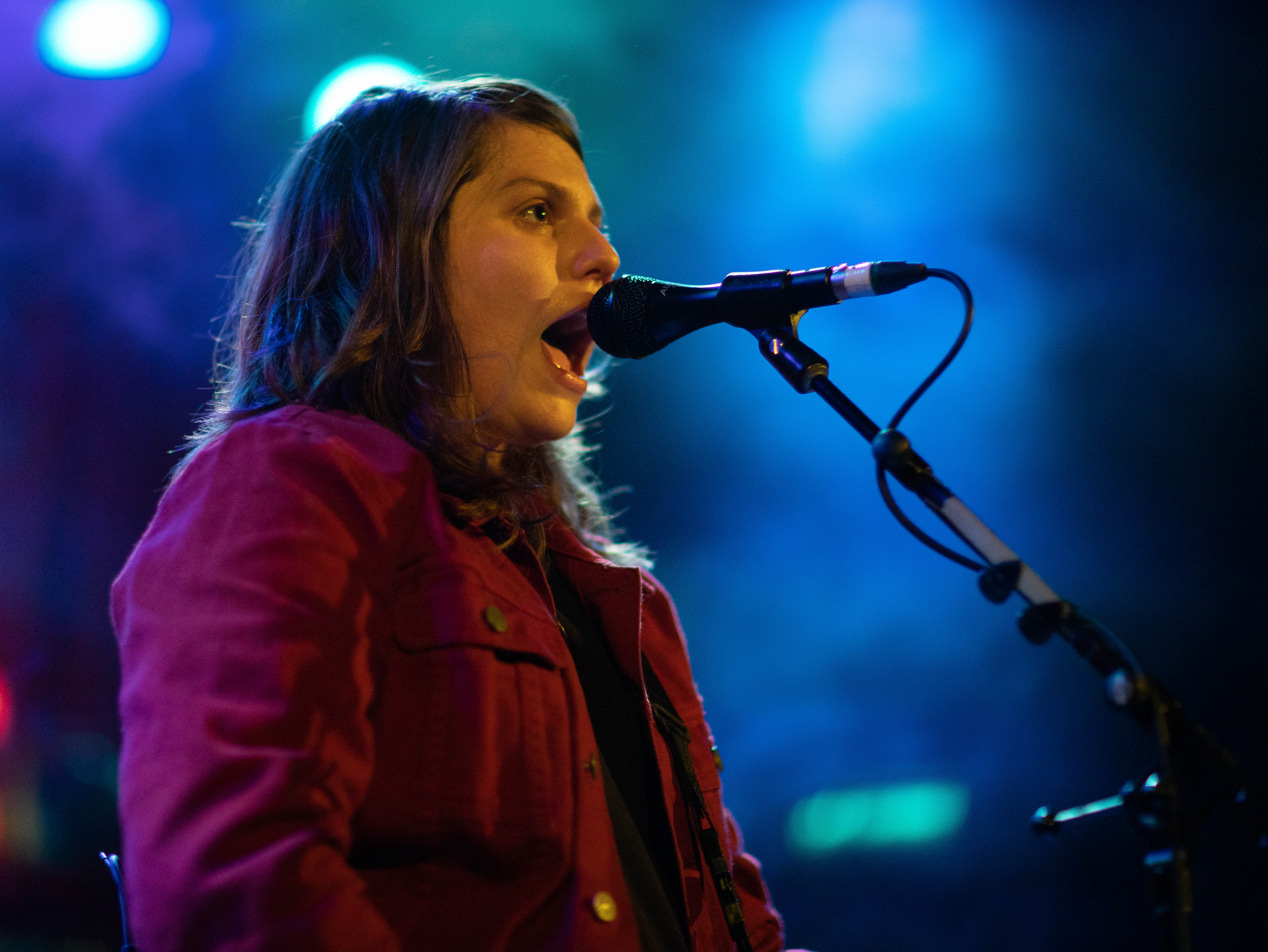 Alex Lahey